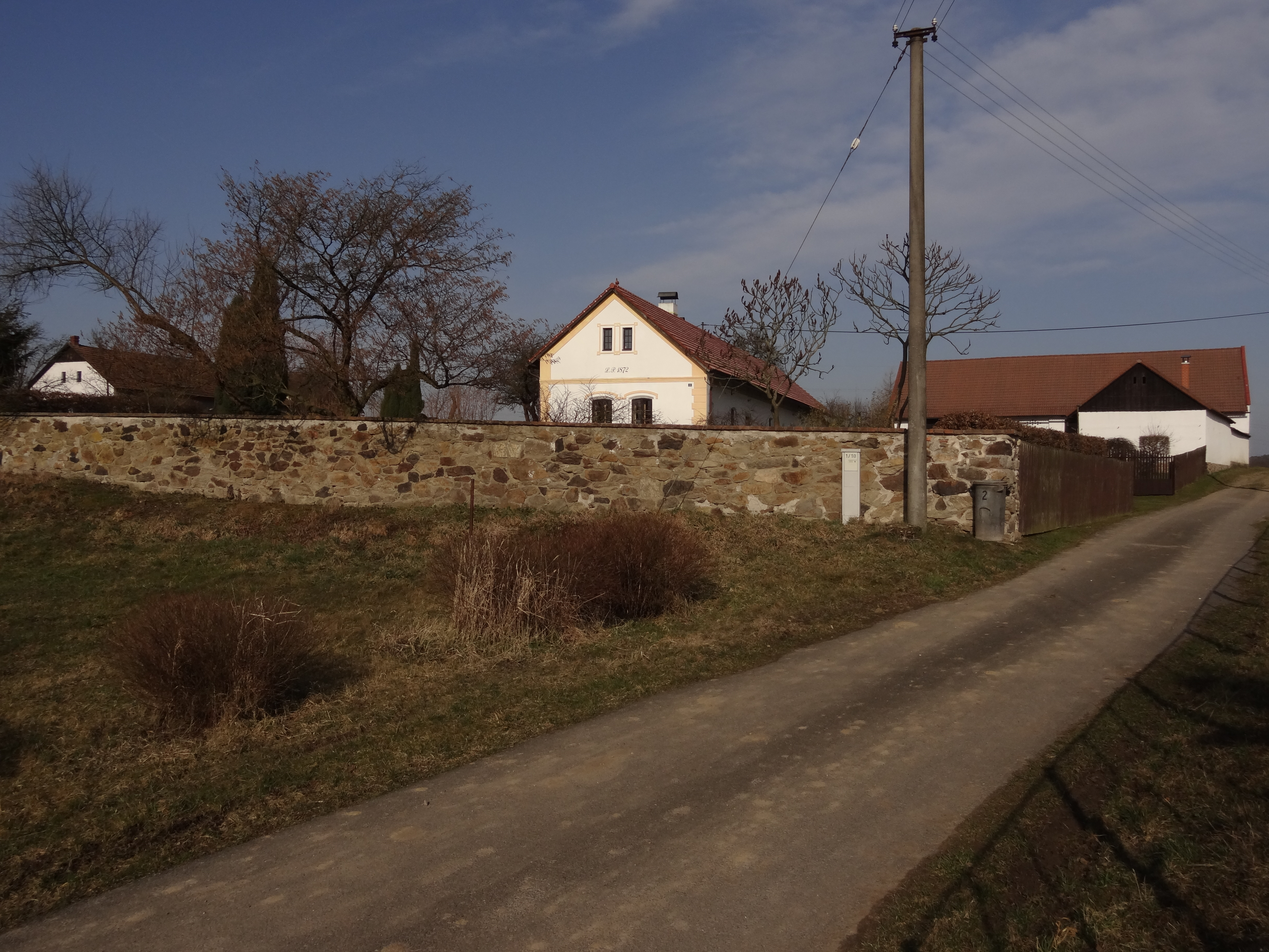 Vestecká Lhotka - čp. 2